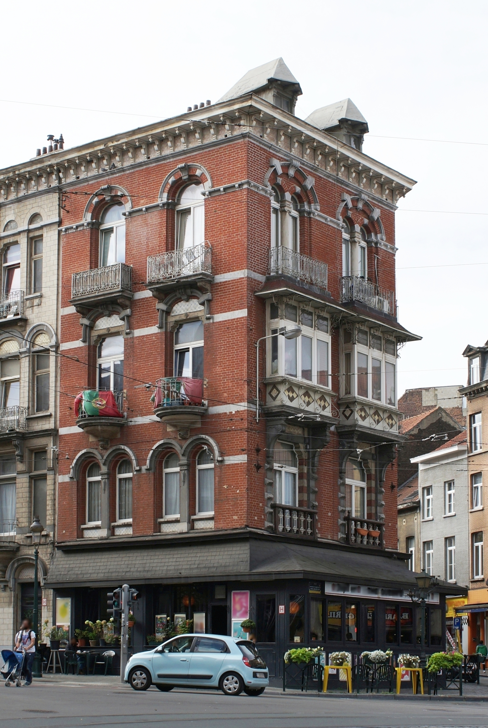 Sint-Gillis, Alsembergsesteenweg 2 (Eclectische stijl) (1897). Oeuvre van architect Ernest Delune.